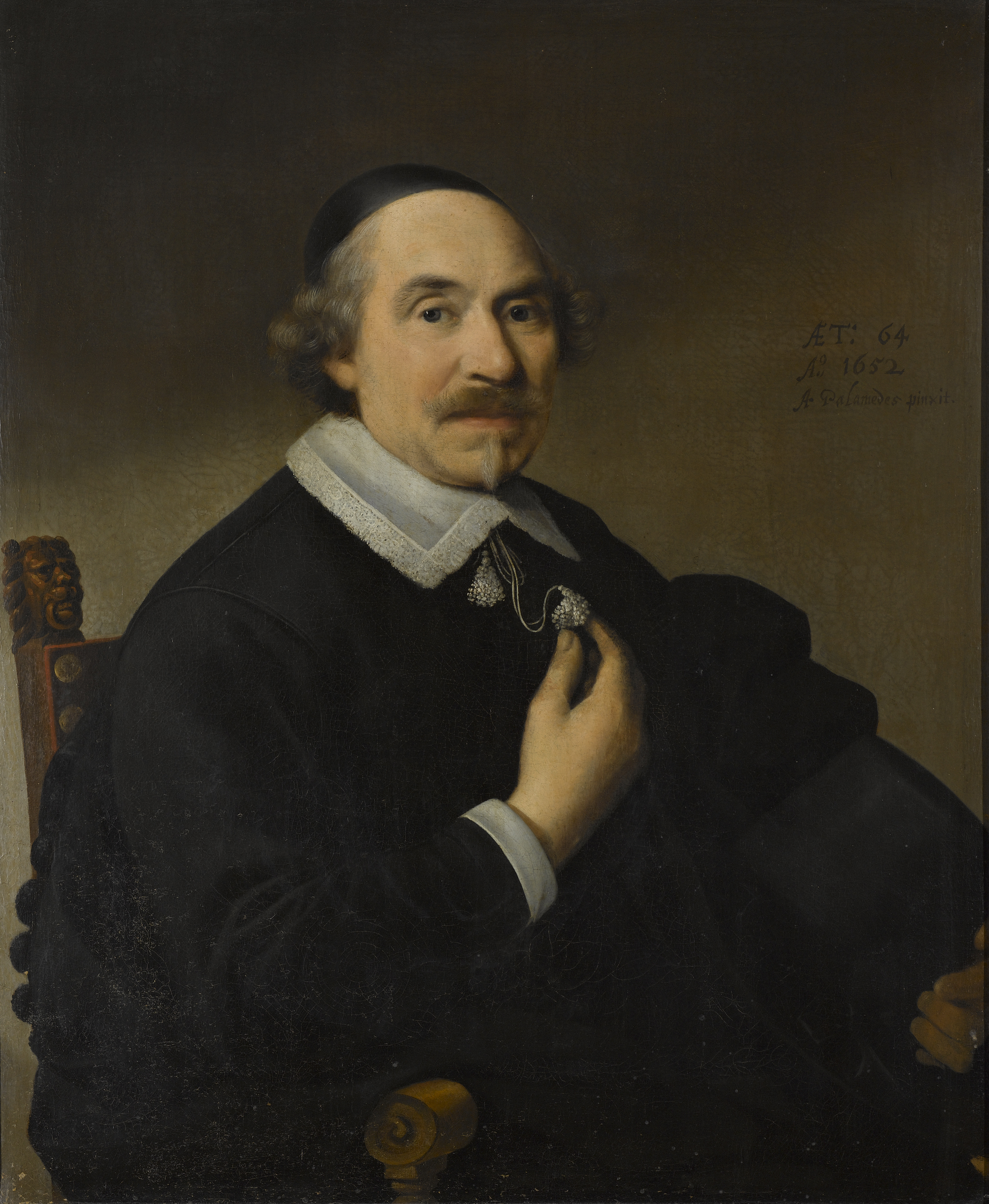 Portret van een man, waarschijnlijk Pieter Anthonisz van Bronckhorst (1588-1661). Ten halven lijve, zittende in een stoel, met de rechterhand pakt hij een kwastje van zijn kraag vast. Pendant van SK-A-1616.